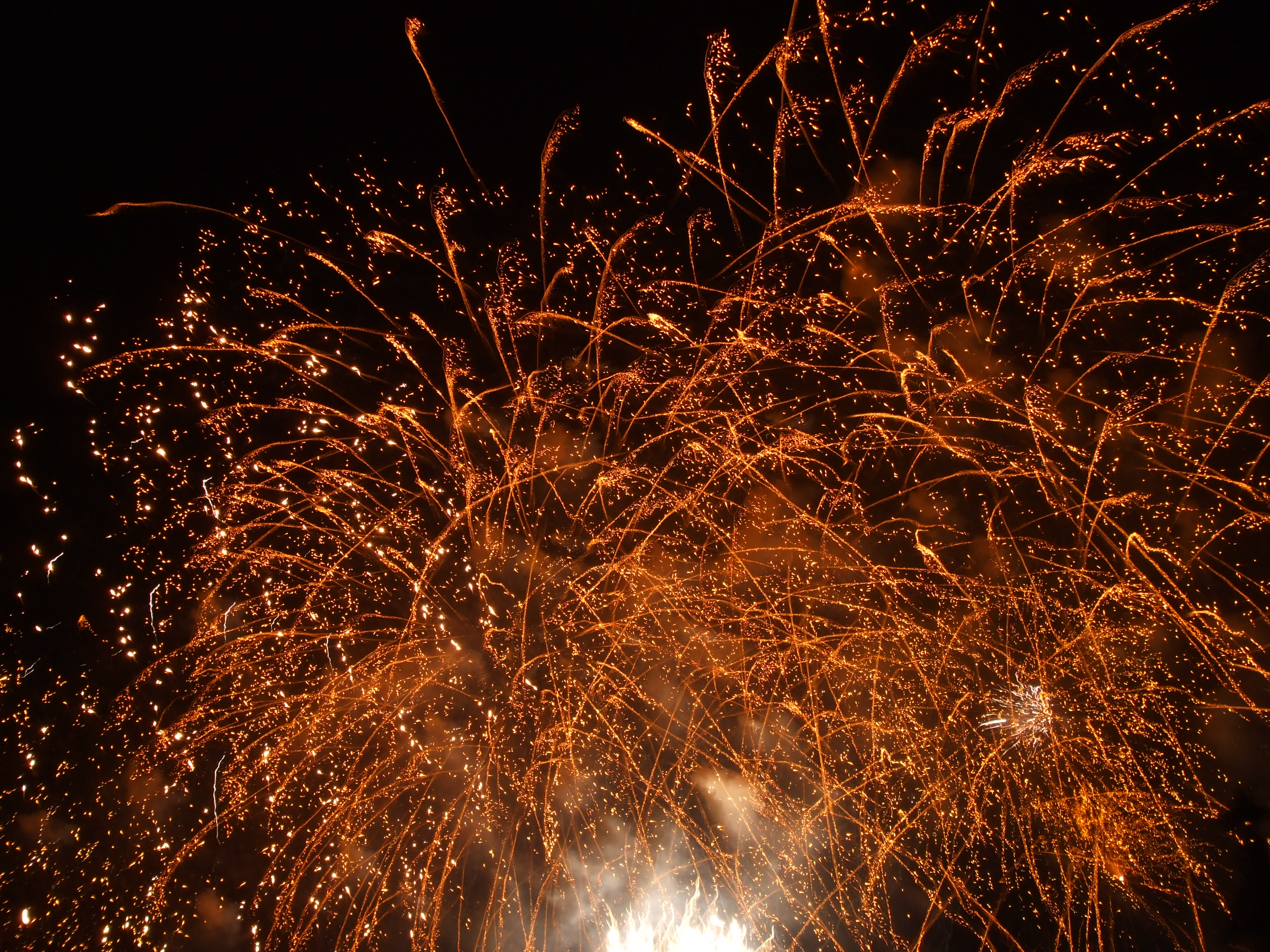 Feux d'artifice lors de la Fête du Fleuve 2008, sur la place de la Bourse à Bordeaux.